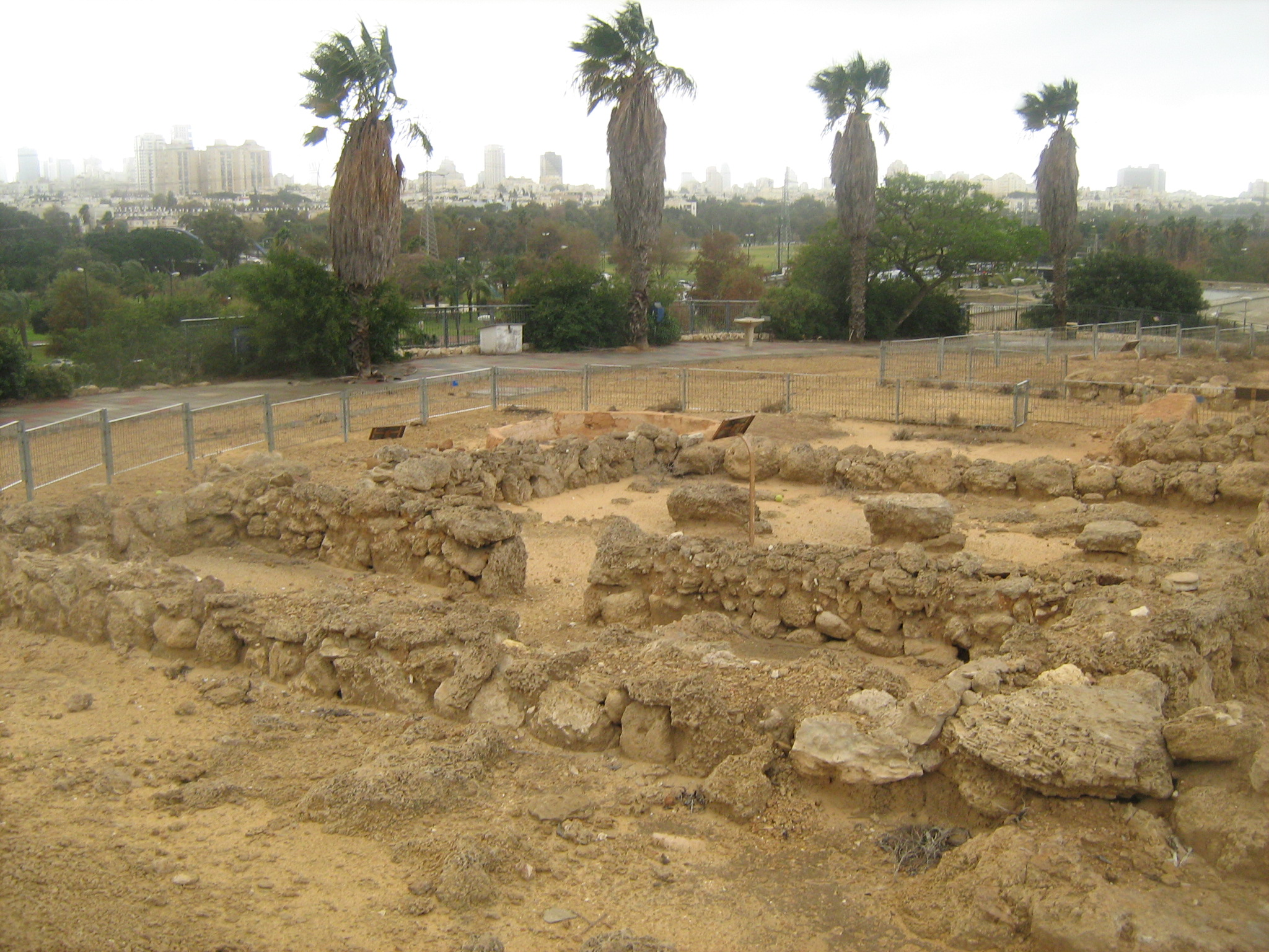 תל קסילה